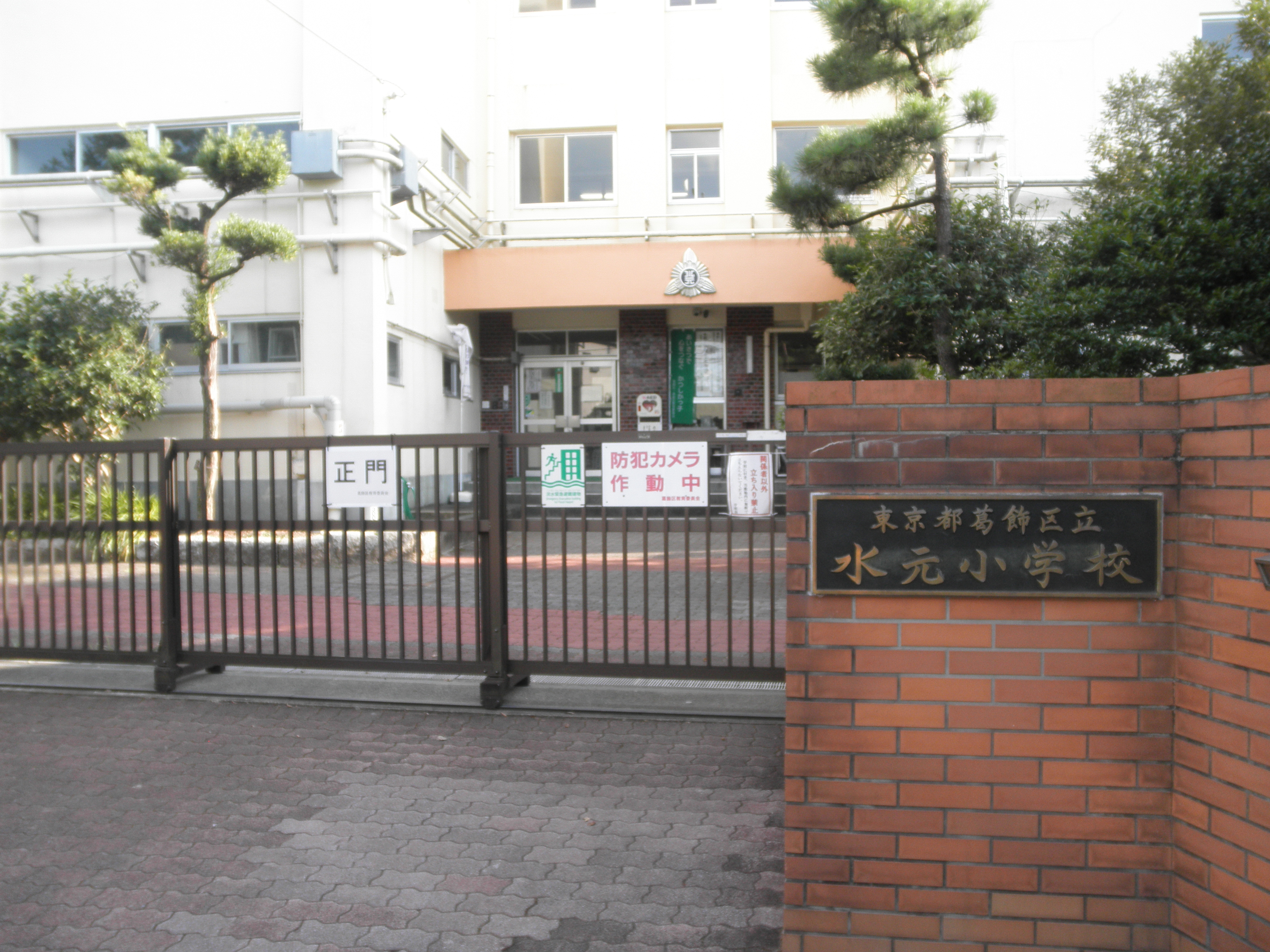 水元小学校の校名、校章が写っている